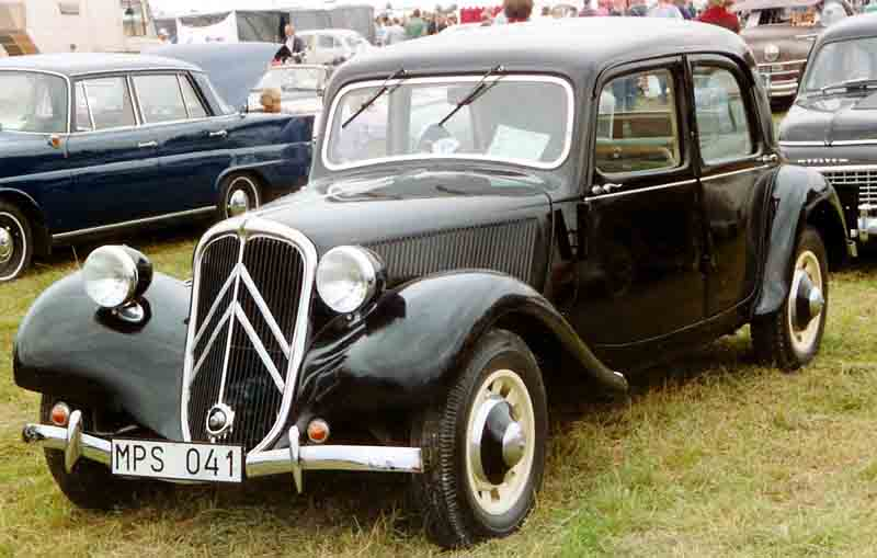 Citroen 11B Berline Legere 1947